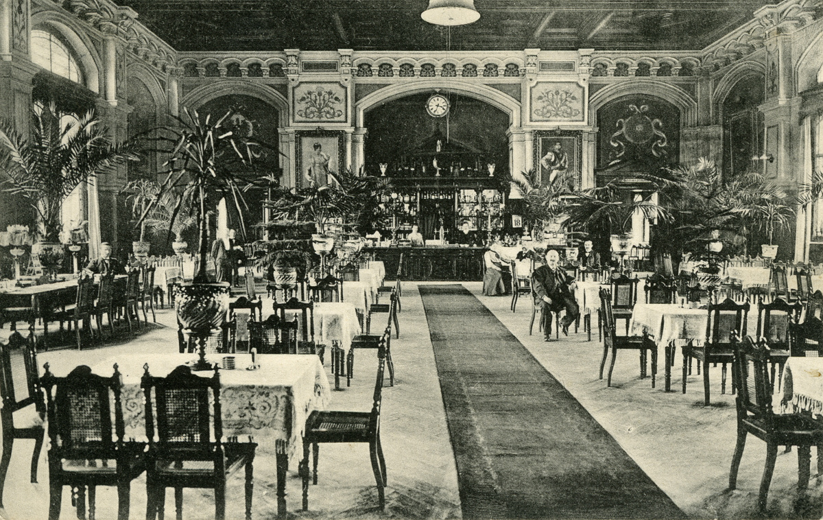 Die Wartehalle bot den Reisenden 1. und 2. Klasse ein elegantes Restaurant zum Verweilen.